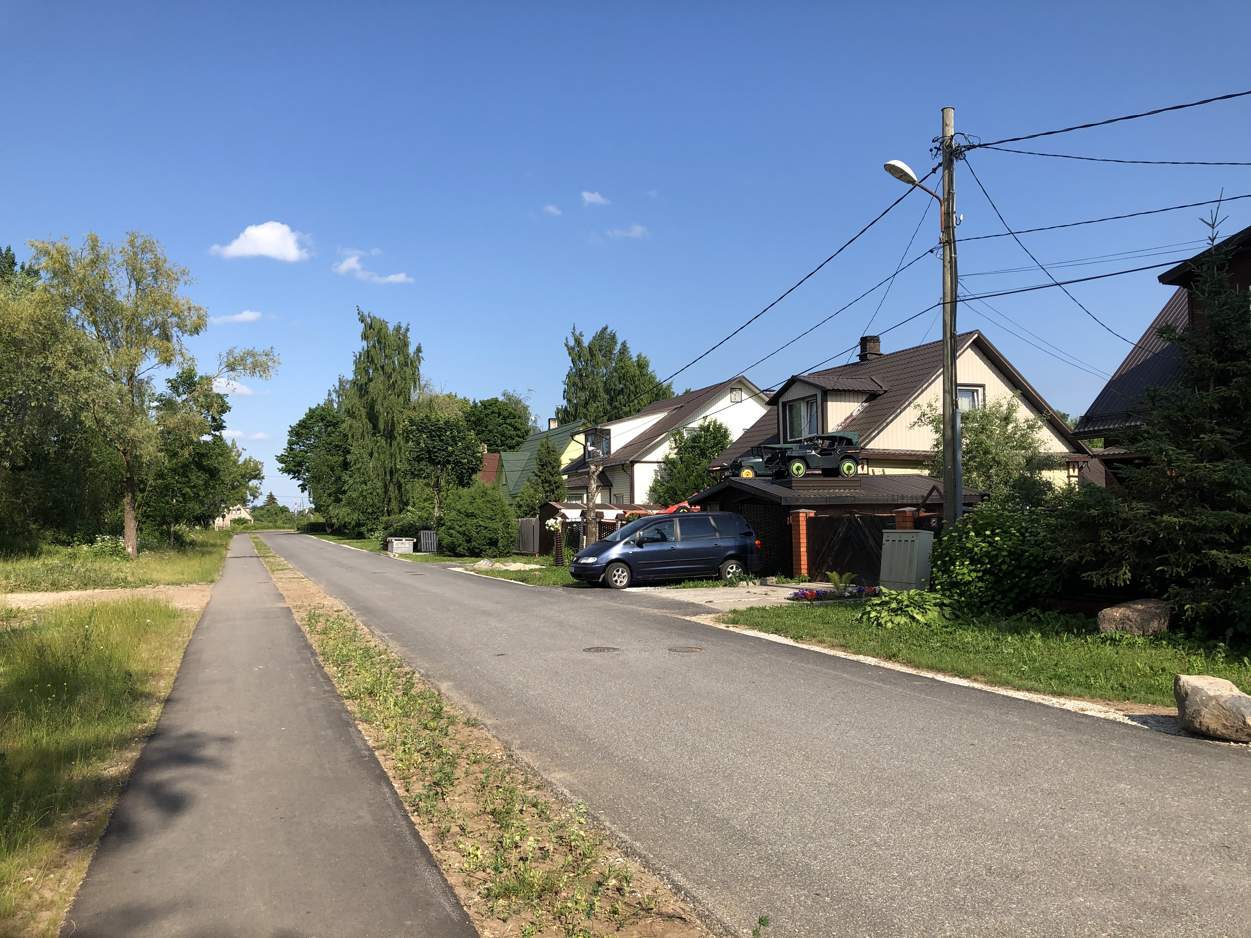 A.Juhhanovi tänav, Narva